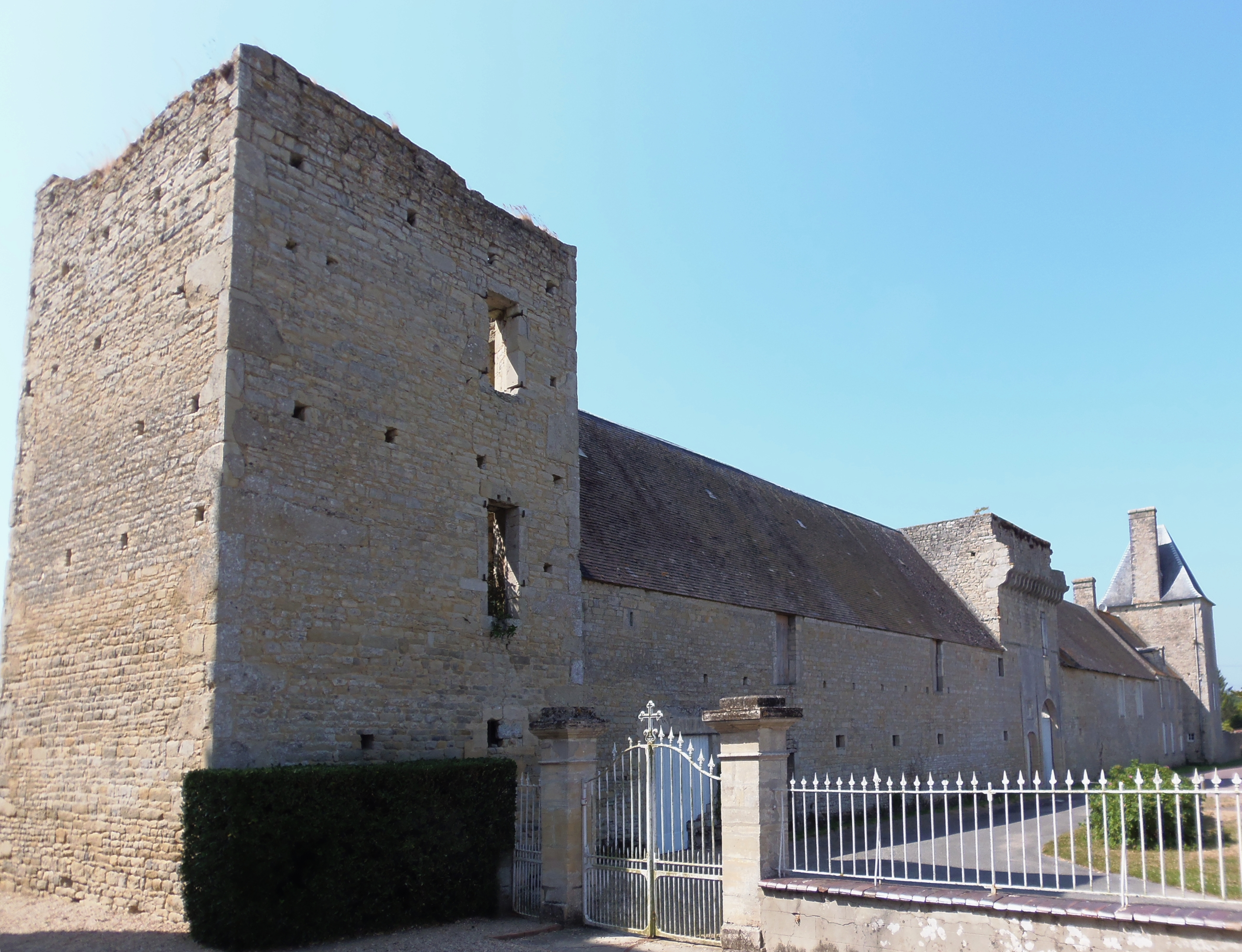 Canchy (Normandie, France). La façade est du château.